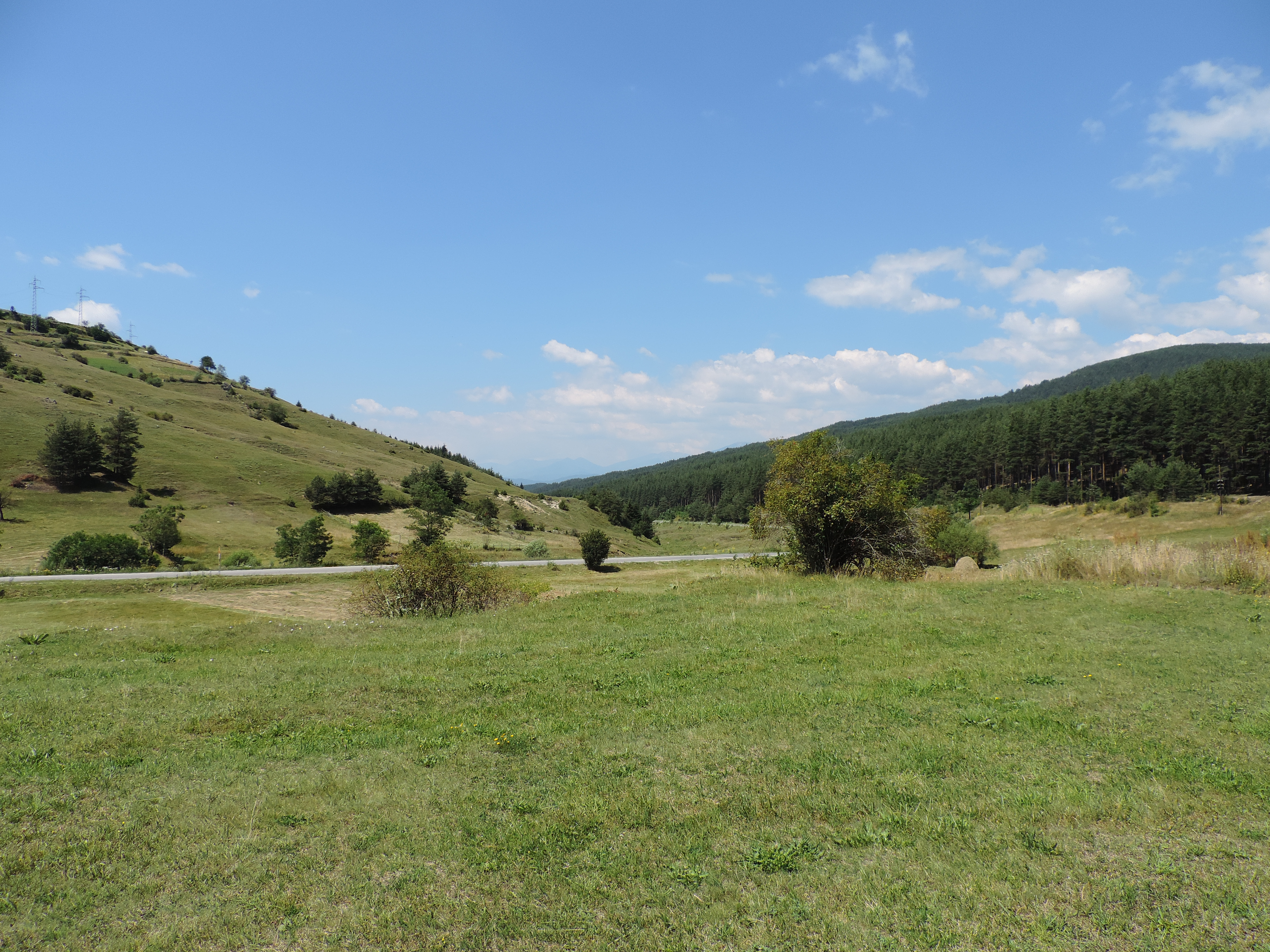 Аврамовата седловина